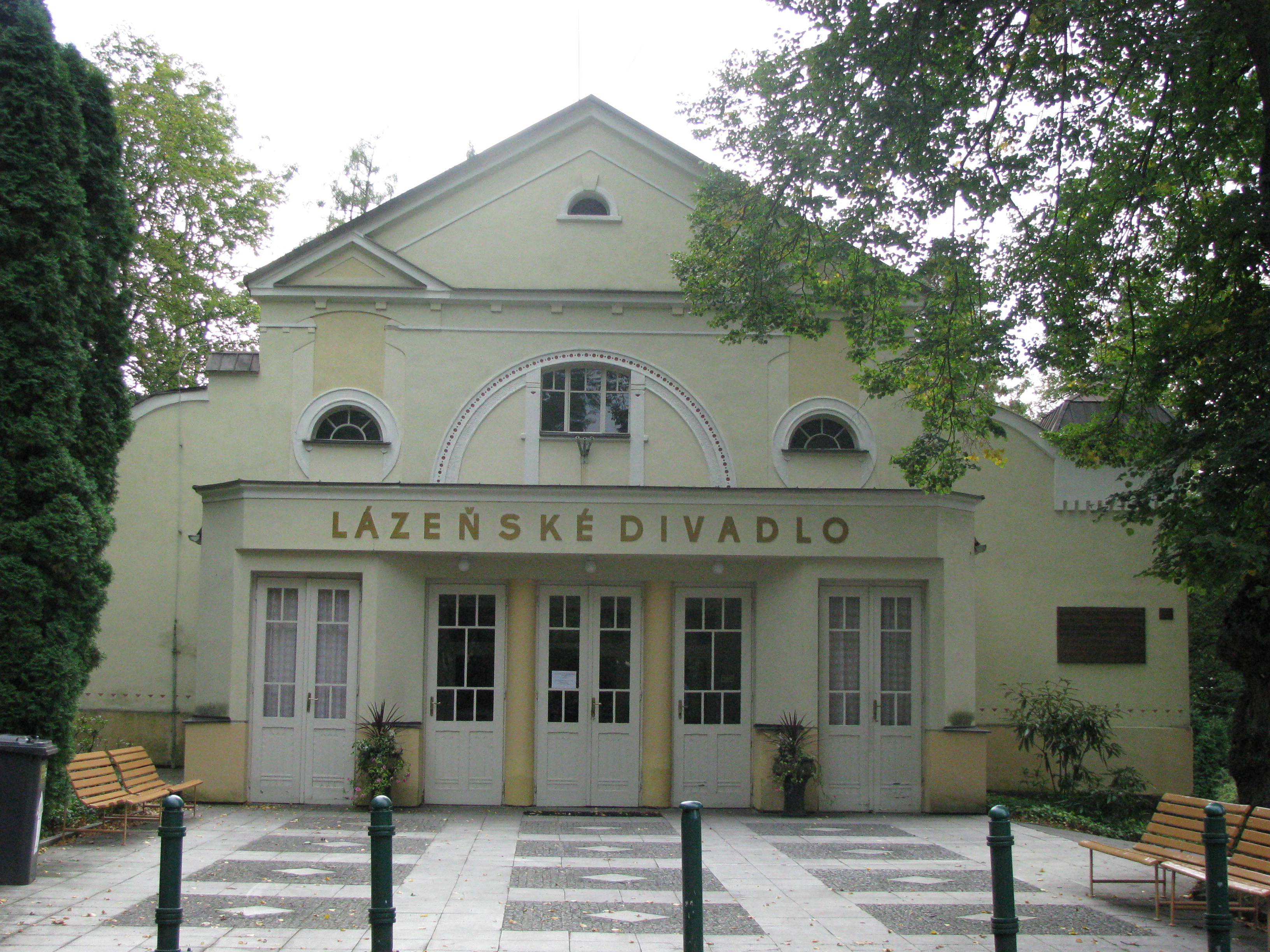 Divadlo - Lázeňské (Luhačovice), ul. Dr. Palka Blaho 289, Luhačovice